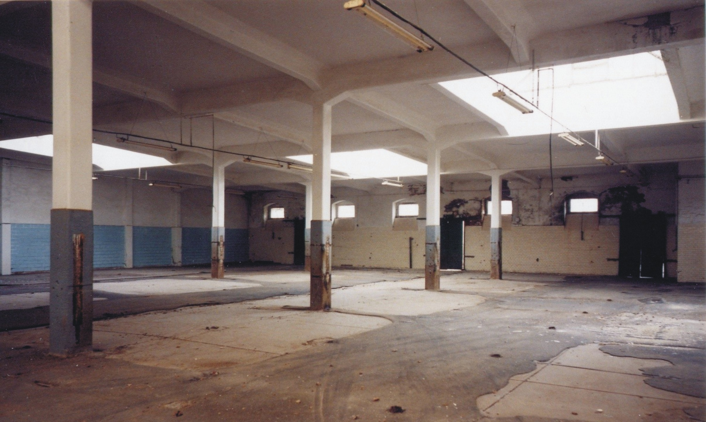 Dresdner Vieh- und Schlachthof, Innenansicht einer ehemaligen Halle im Bereich Schlachthof